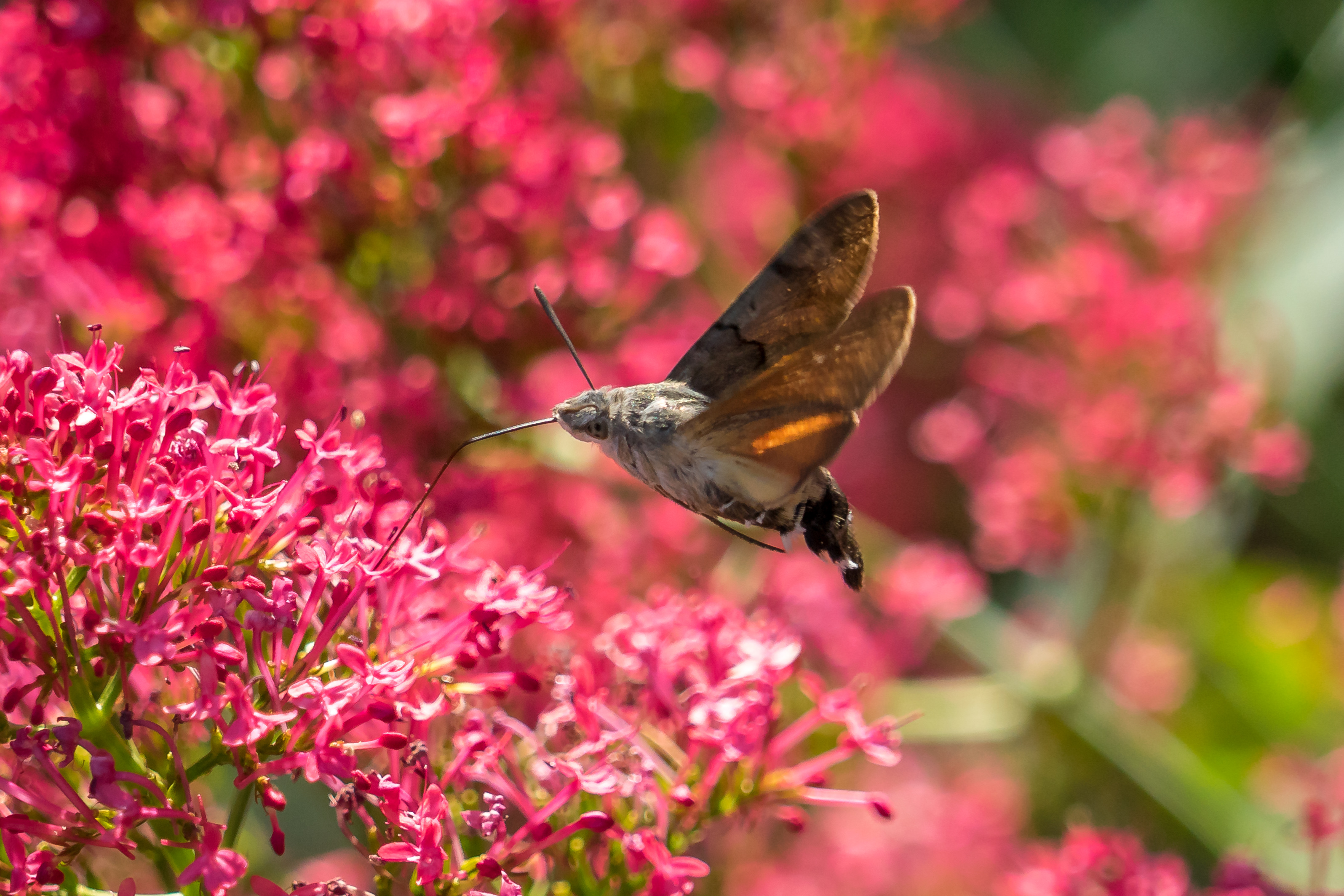 Macroglossum stellatarum